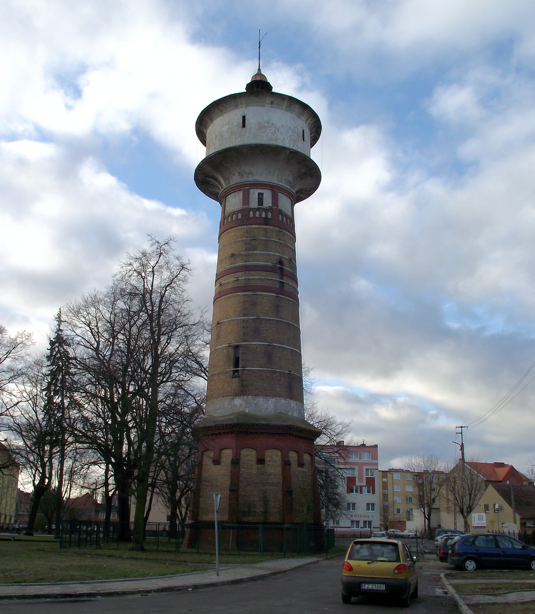 Sulechów, ul. 31 Stycznia - wieża ciśnień z końca XIX wieku